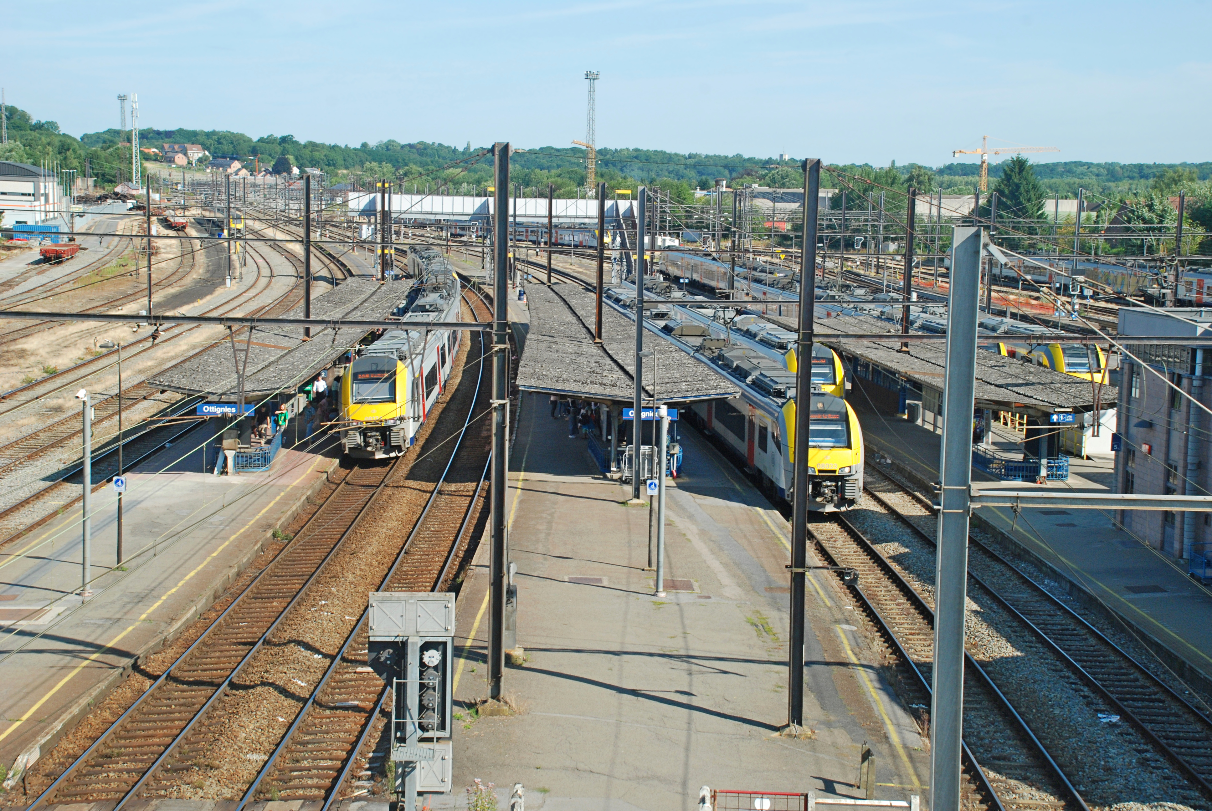 Belgique - Brabant wallon - Ottignies-Louvain-la-Neuve - Gare d'Ottignies